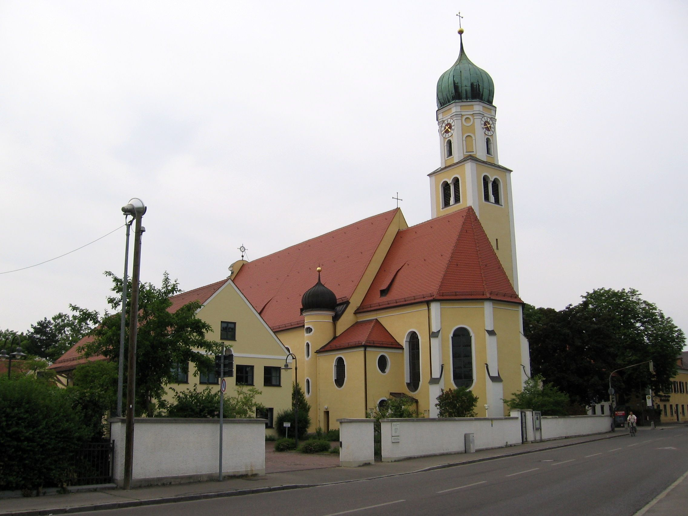 Zusehen ist die Georgskirche in Haunstetten